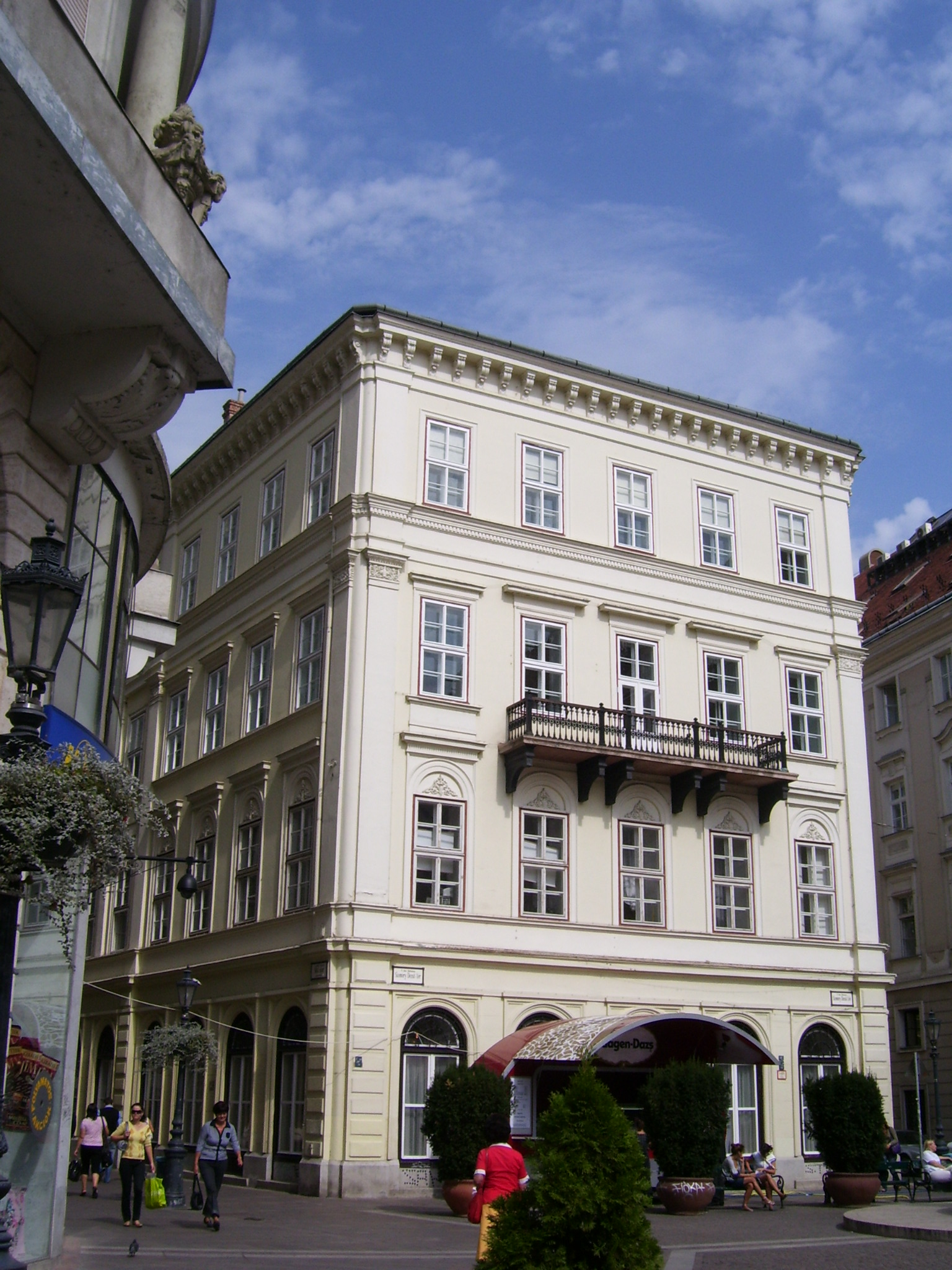 A Deák téri evangélikus gimnázium épülete (Budapest, V. ker.)